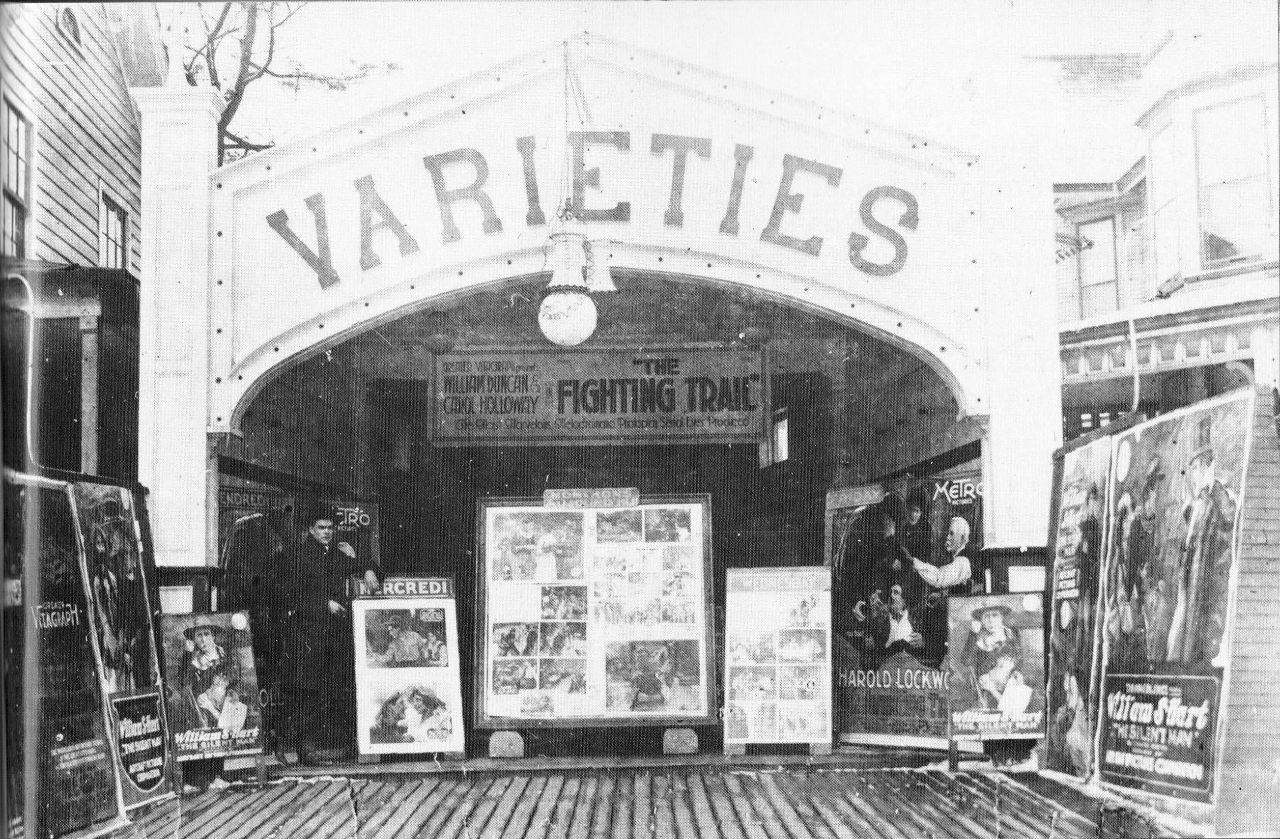 Le théâtre Varieties à Granby, Québec entre 1909 et 1920. On y voit Paul Page devant son cinéma, situé sur l'emplacement actuel du Palace.